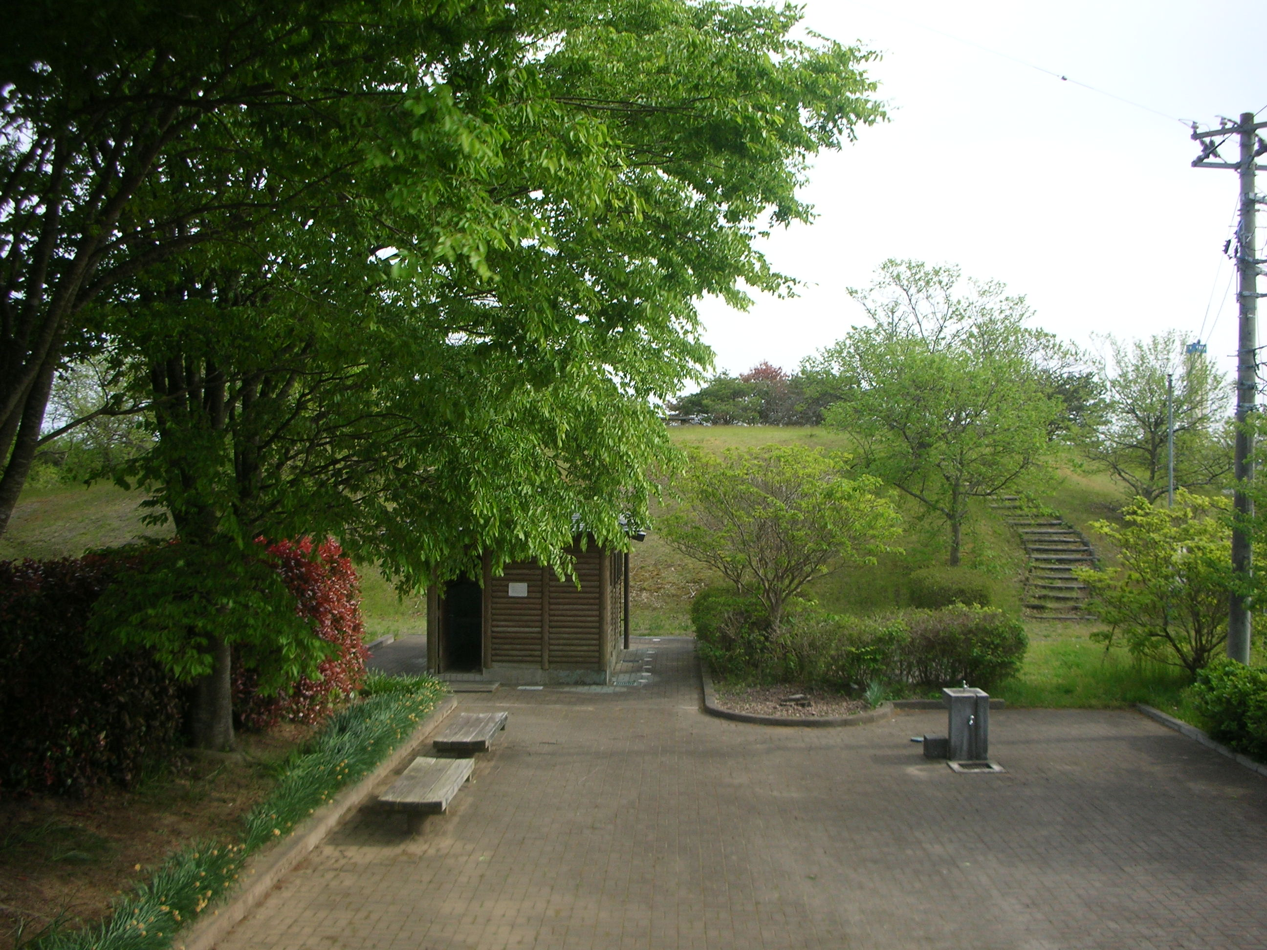 笑沢自然公園